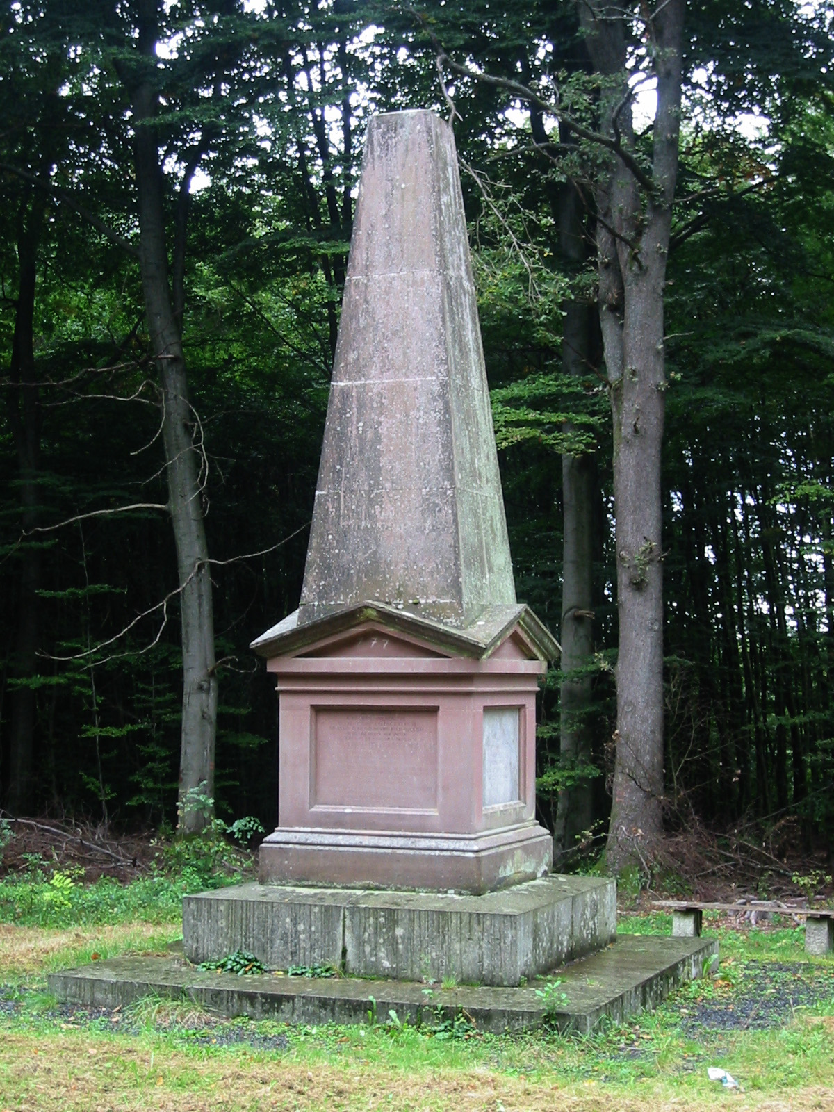 Denkmal für General Marceau, der hier, bei Höchstenbach (Westerwald), tödlich verwundet wurde.